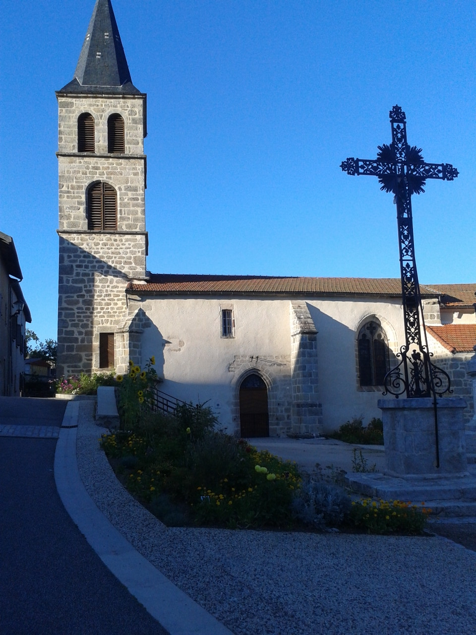 Église Saint-Étienne de Connangles